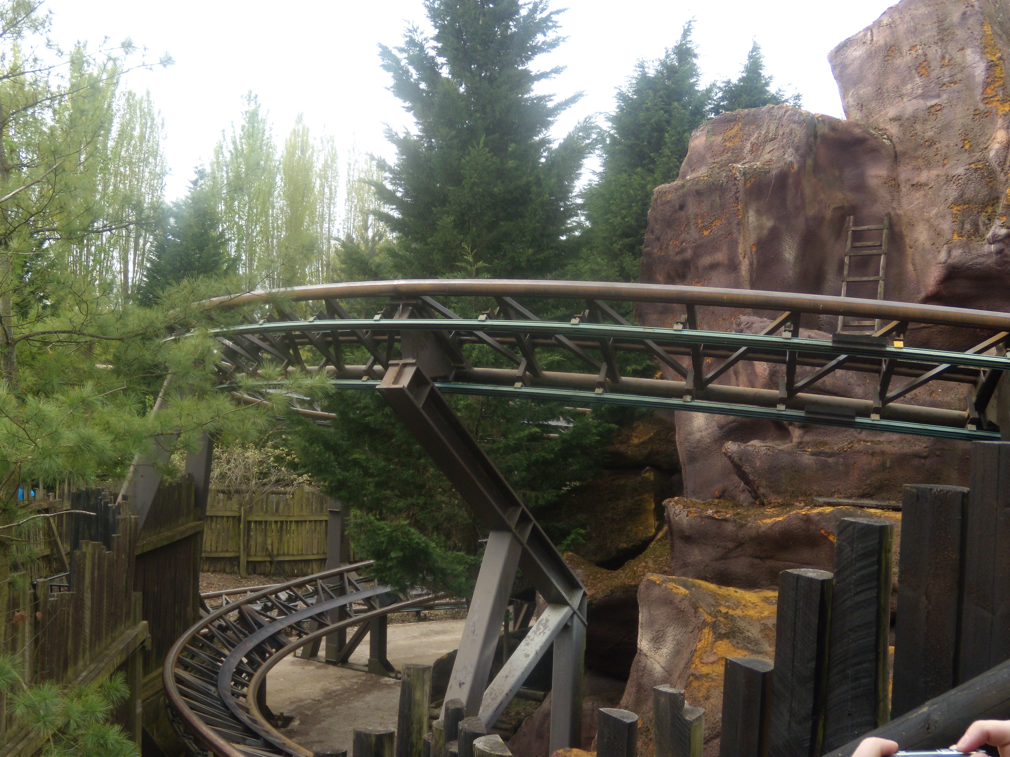 Montagnes russes Runaway Train à Chessington World of Adventures, en Angleterre.